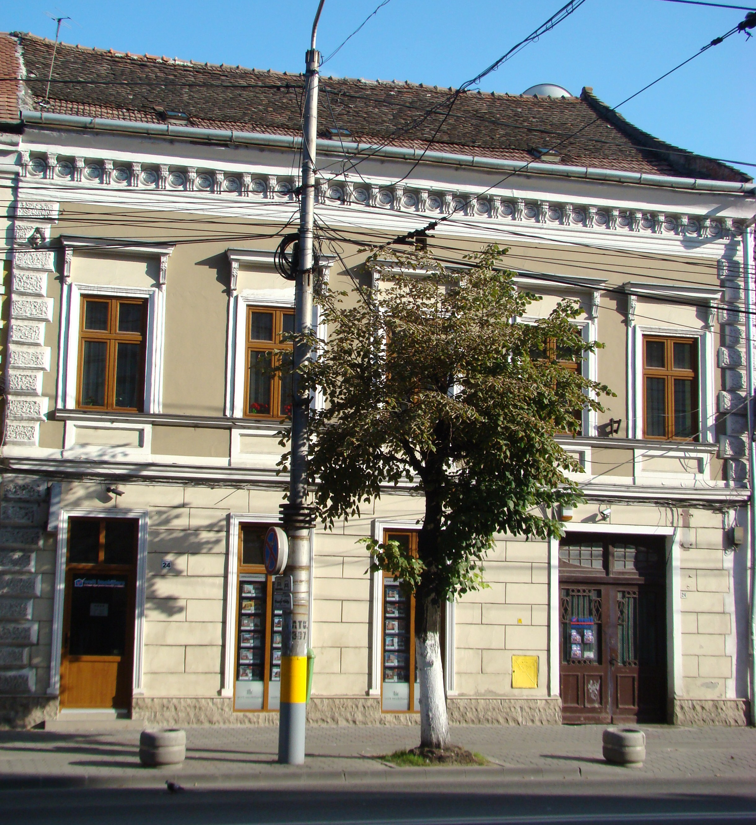 Casă, monument istoric, Bd.21 Decembrie 1989, nr.24